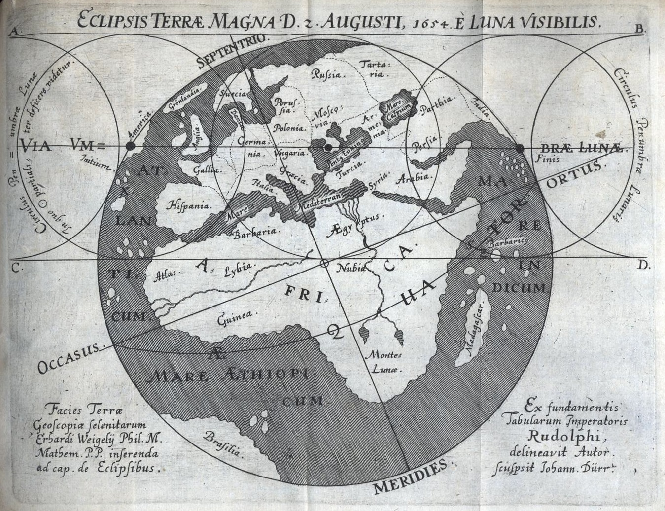 Erhard Weigel, vorausberechnete Kartendarstellung des Mondschattenverlaufs am 2. (jul.)/12. (greg.) August 1654